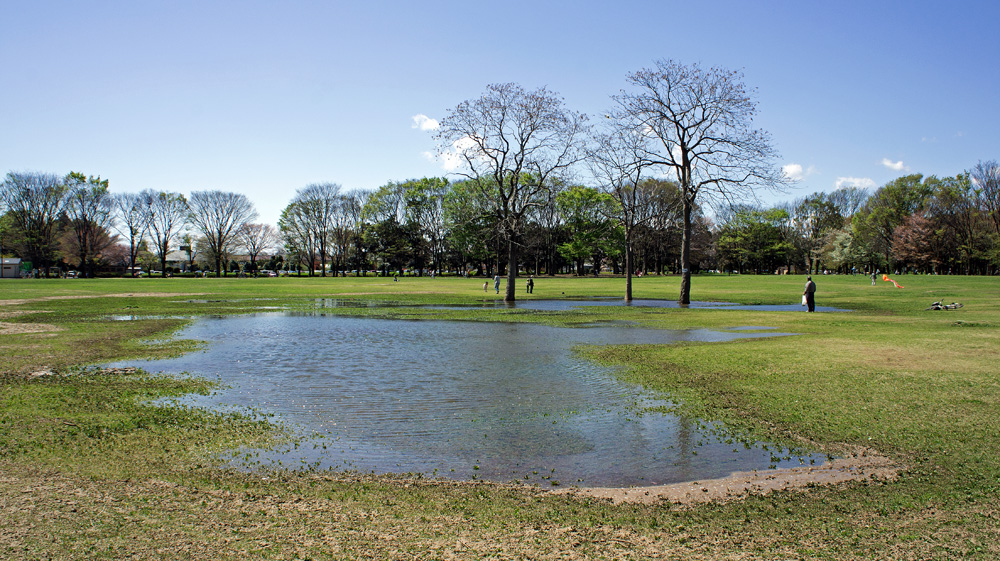 小金井公園・春の嵐 2013.04.07 10:51